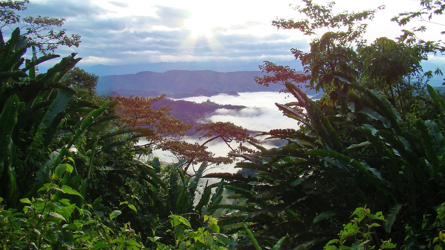 Un hermoso municipio que todos deberían darse la oportunidad de visitar.